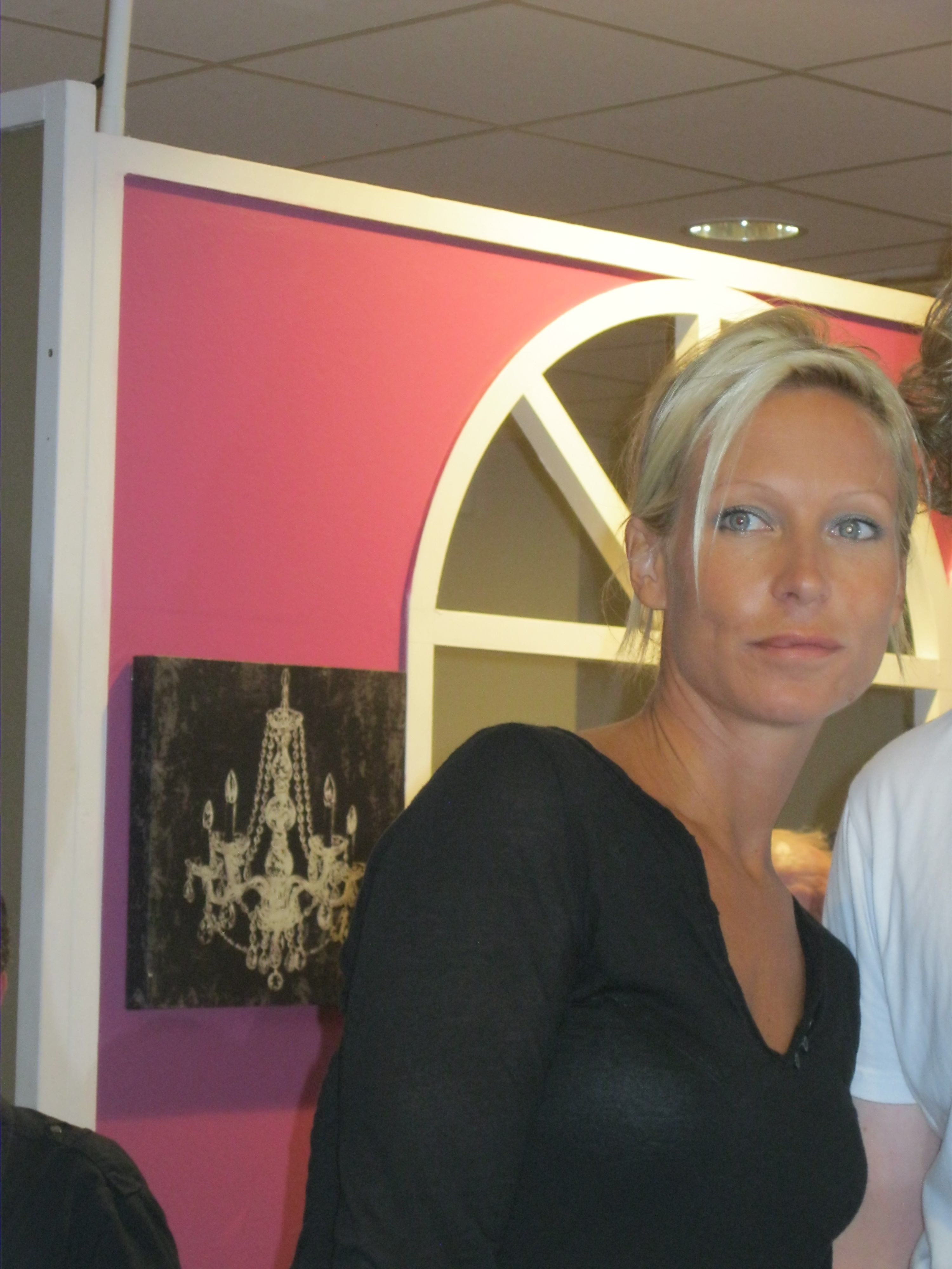 Rebecca Hampton lors d'une séance de dédicaces en octobre 2011